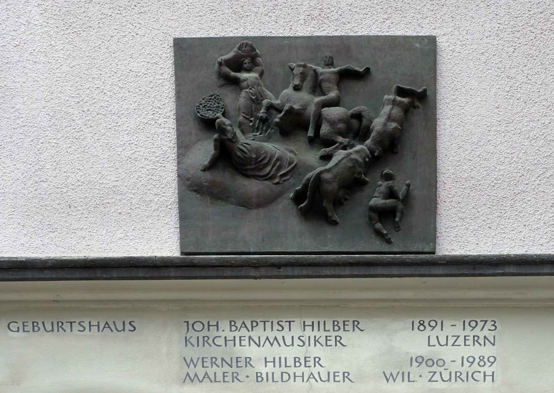 Werner Hilber (* 30. August 1900 in Will, St. Gallen; † 5. November 1989 in Kronbühl-Wittenbach) war ein Schweizer Bildhauer, Maler Musiker, Schreiber Philosoph und Lebenskünstler. Geburtshaus, Böckebrunnen, Bärenbrunnen